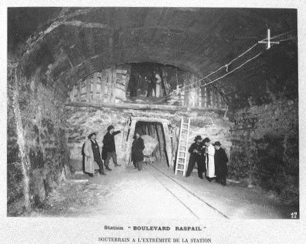 Construction du chemin de fer métropolitain municipal de Paris. Ligne circulaire sud 1902-1905. Station "boulevard Raspail", souterrain à l'extrémité de la station. [cote BNF : PH451A]